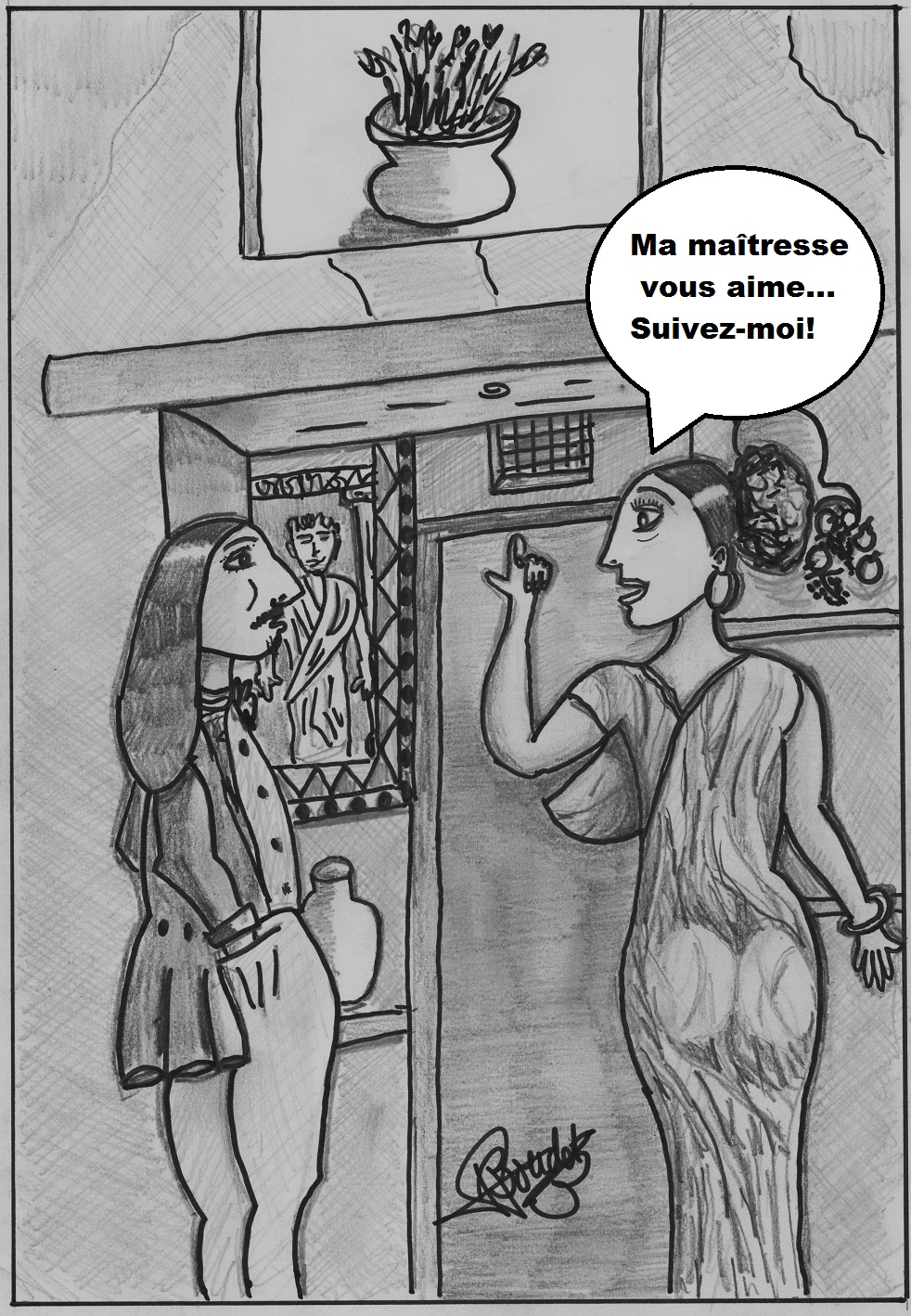 Dessin de Jean-Pierre Boudet pour illustrer la nouvelle Arria Marcella de Théophile Gautier.